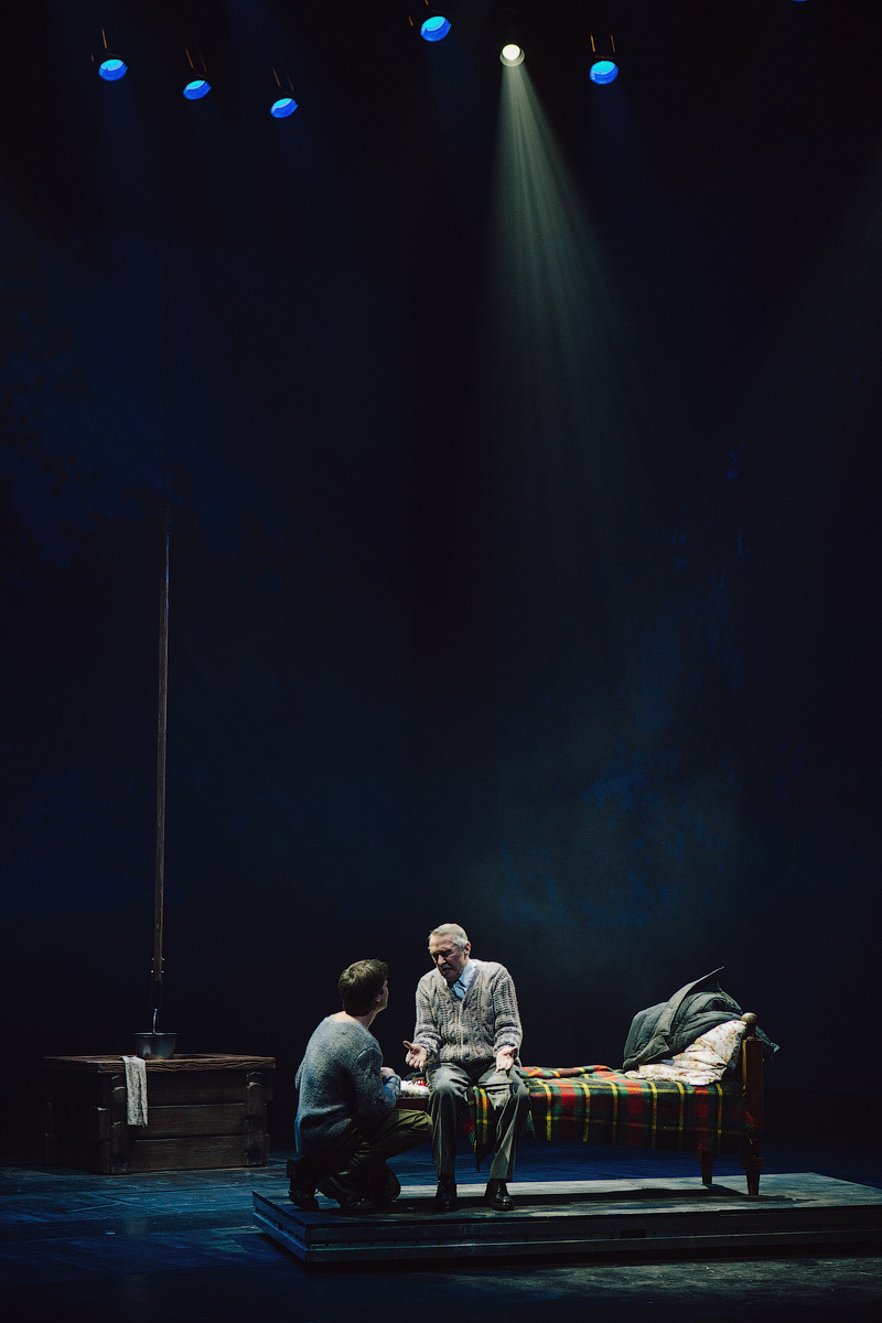 Спектакль "Тата" Национального академического драматического театра им. Я. Купалы